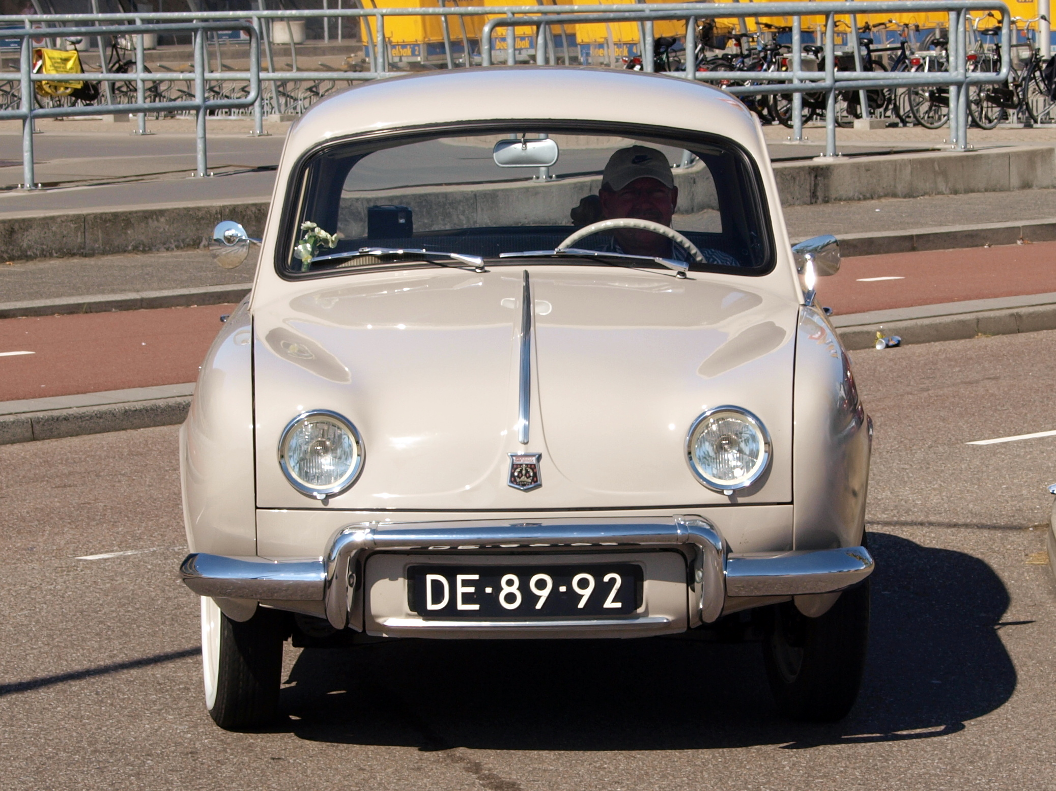 Renault Dauphine DE-89-92